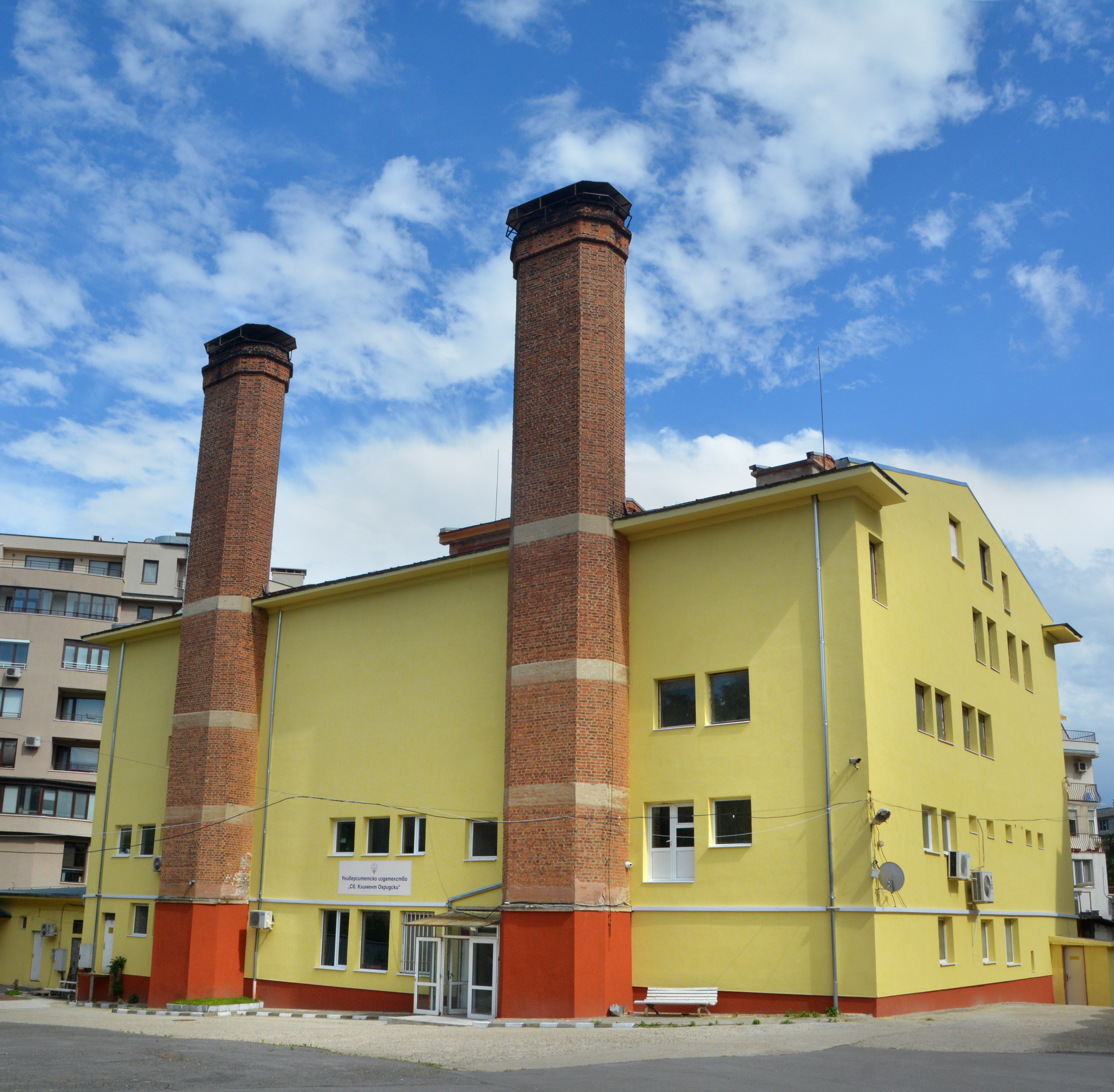 The building of University Publishing House "St. Kliment Ohridski"